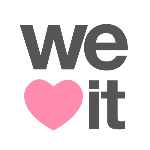 ...Czech Republic..